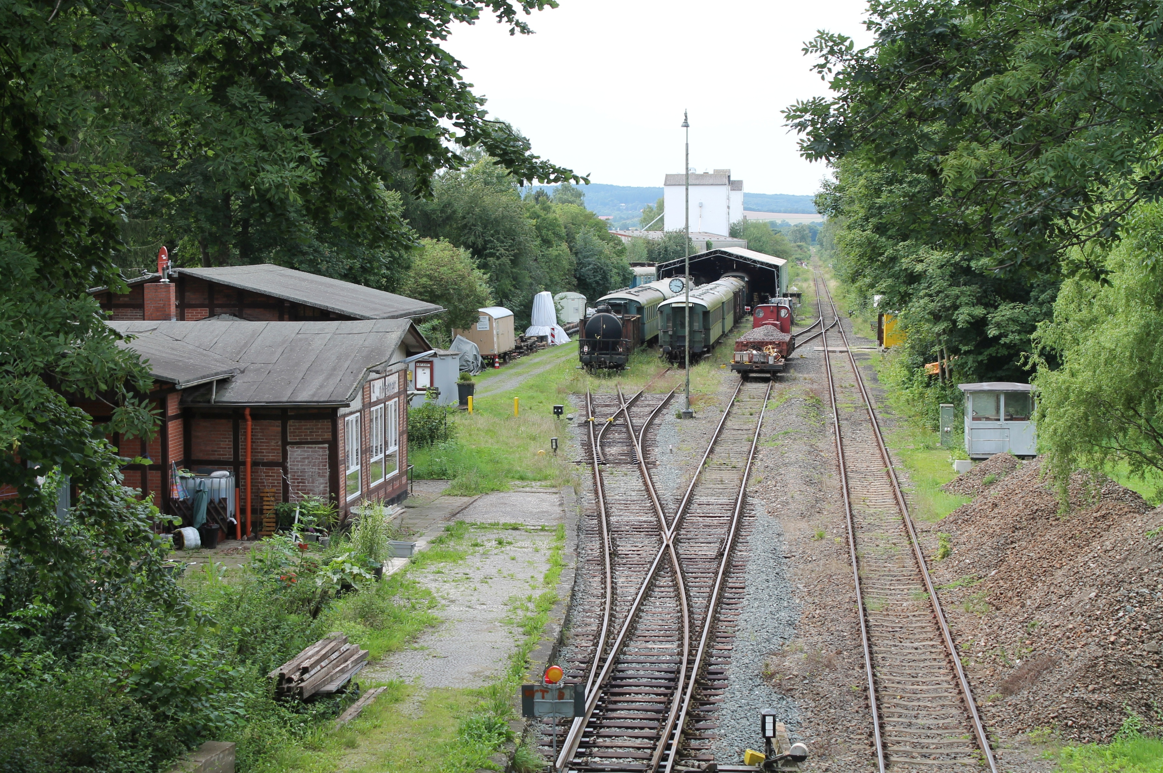 Bahnhof Klein Mahner der Warnetalbahn.